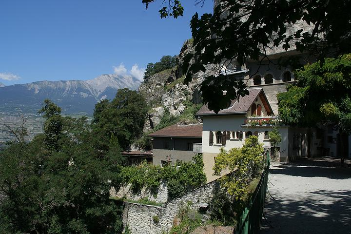 L'ermitage de Longeborgne, dans les gorges de la Borgne, au-dessus de la commune de Bramois en Valais (Suisse)